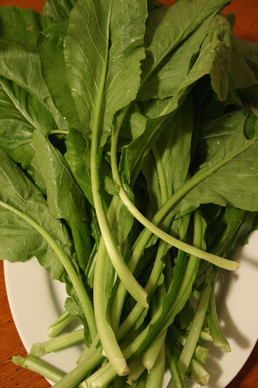 mustard greens